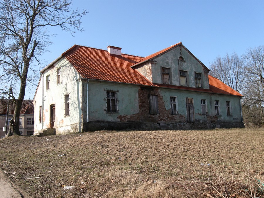 Ustnik, budynek w zaspole dworsko-folwarcznym